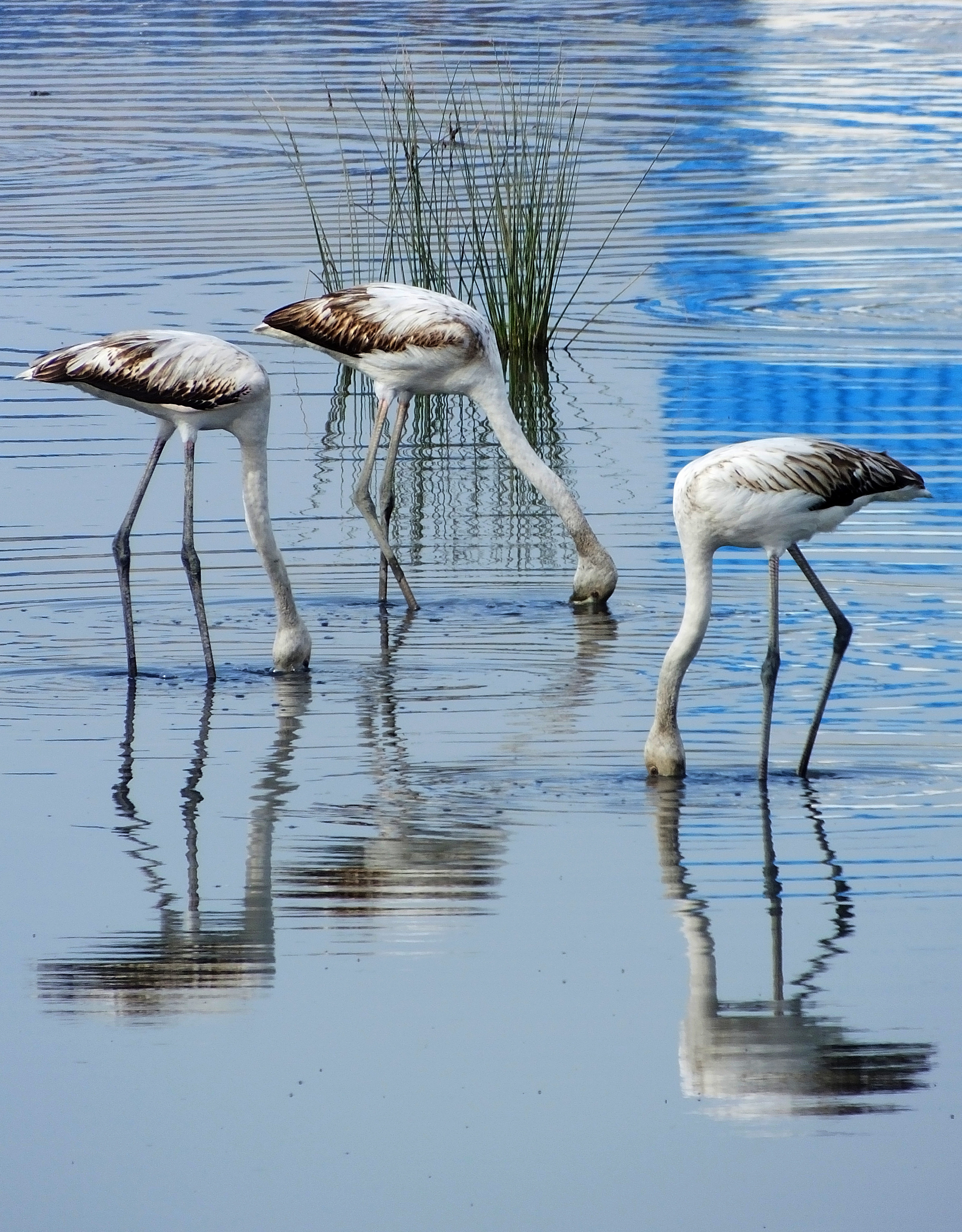 Flamants à sebkhet Esséjoumi